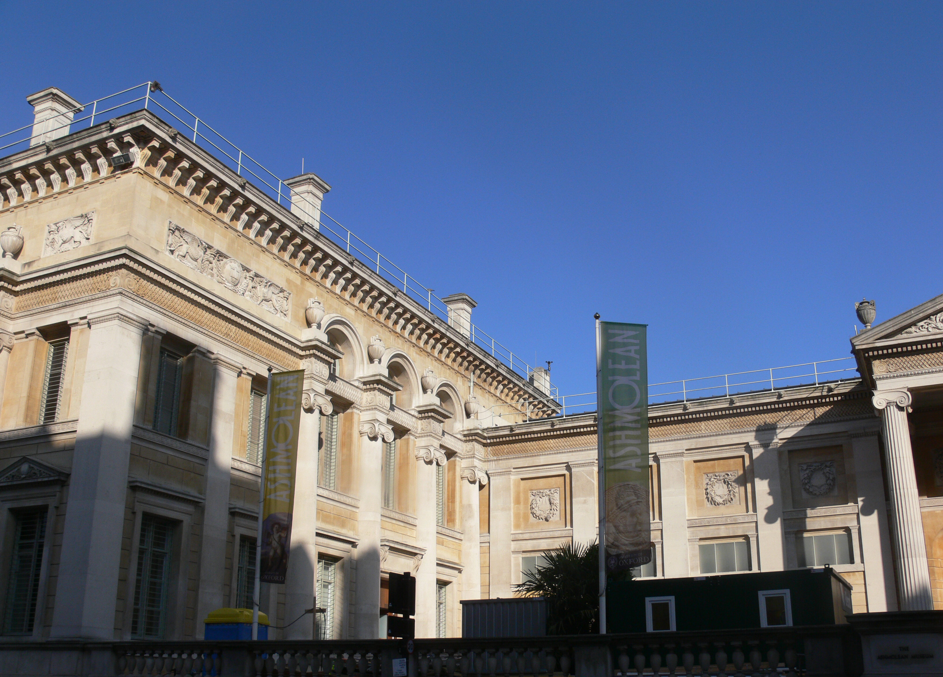 Oxford - Ashmolean Museum